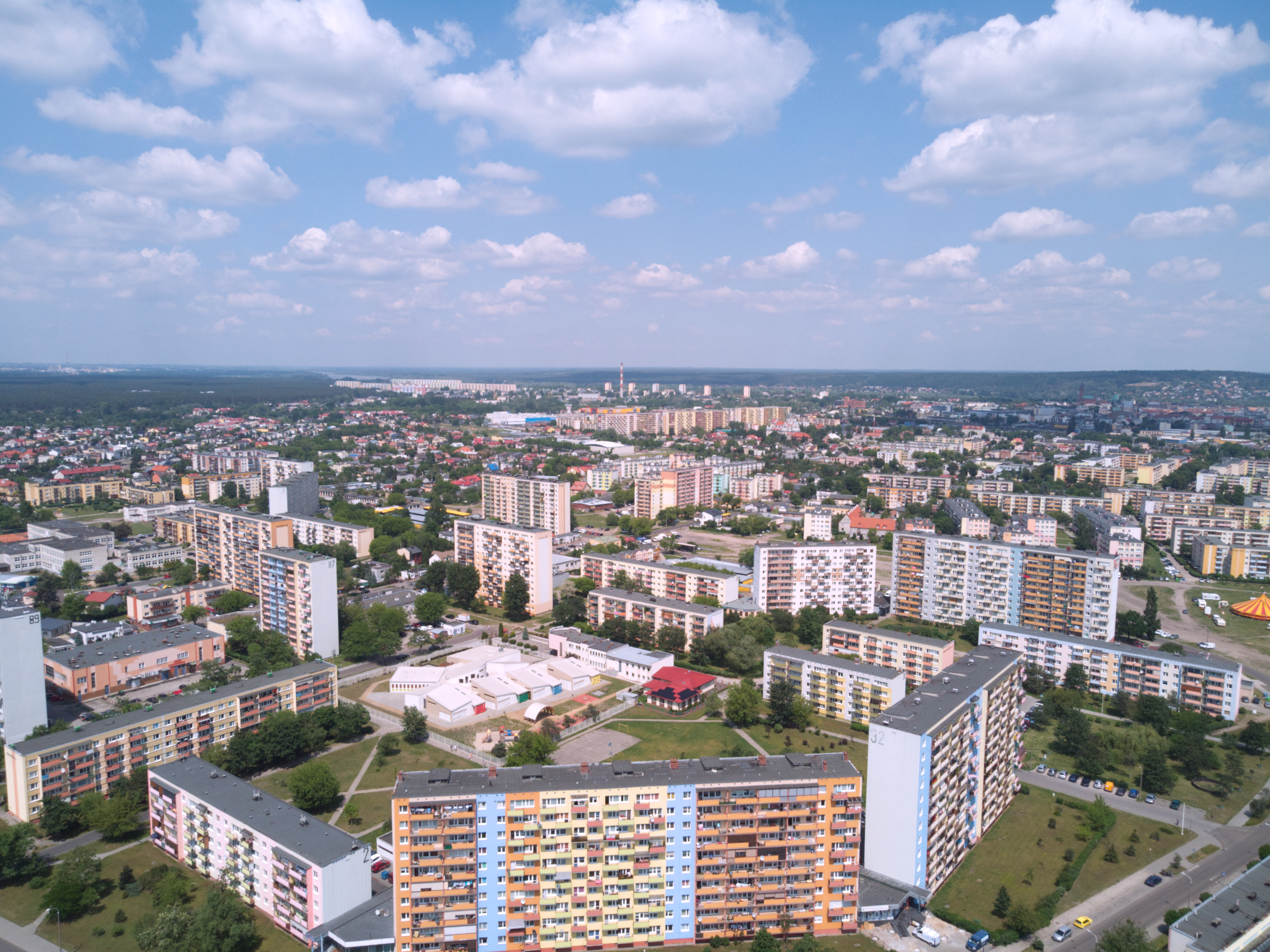 Dzielnica Południe z lotu ptaka (2020 r.)